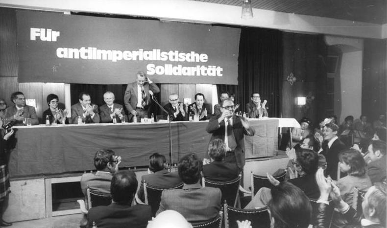 ADN-ZB Link 31.3.1976 BRD-Bonn DKP-Parteitag 1976 Vom 19. bis 21.3.1976 fand in der Bonner Beethoven-Halle der Parteitag der Deutschen Kommunistischen Partei (DKP) statt. Er stand unter der Losung: "Mit der DKP gegen das Großkapital - für soziale und demokratische Rechte - für Frieden,Freiheit und Sozialismus". An den dreitägigen Beratungen nahmen 630 Delegierte und 140 Gastdelegierte teil. Begeistert begrüßt hatten die Delegierten die Abordnung von 36 Kommunistischen und Arbeiterparteien aus Europa, Asien und Lateinamerika, darunter auch eine Delegation des ZK der SED unter Leitung von Paul Verner, Mitglied des Politbüros und Sekretär des ZK. Die Delegierten zogen Bilanz und berieten über die künftigen Aufgaben der Kommunisten in der BRD. UBz: einen Blick auf das Präsidium eines DKP-Meetings in Essen am 20.3.1976, an dem die Delegation des ZK der SED teilnahm. Im Präsidium hatten Platz genommen der Leiter der Delegation, Paul Verner (4.v.r.), Mitglied des Politbüros und Sekretär des ZK, Günter Mittag (4.v.l.), Mitglied des Politbüros des ZK und Erster Stellvertreter des Vorsitzenden des Ministerrates der DDR, Joachim Herrmann (3.v.l.), Kandidat des Politbüros des ZK und Chefredakteur des "Neuen Deutschland", und Herbert Häber (3.v.r.), Abteilungsleiter im ZK der SED. Herzlich begrüßt wurde auch Dr. Michael Kohl (vor dem Präsidium stehend), Leiter der Ständigen Vertretung der DDR in der BRD.